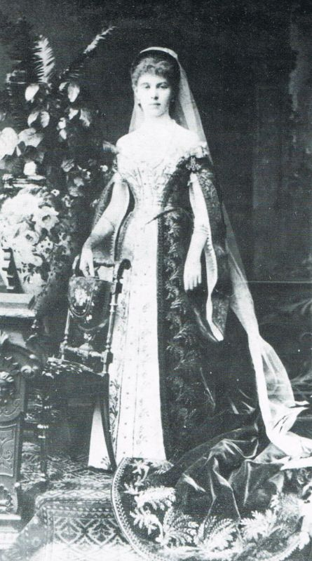 Ольга Владимировна Ден, в замужестве Вонлярлярская